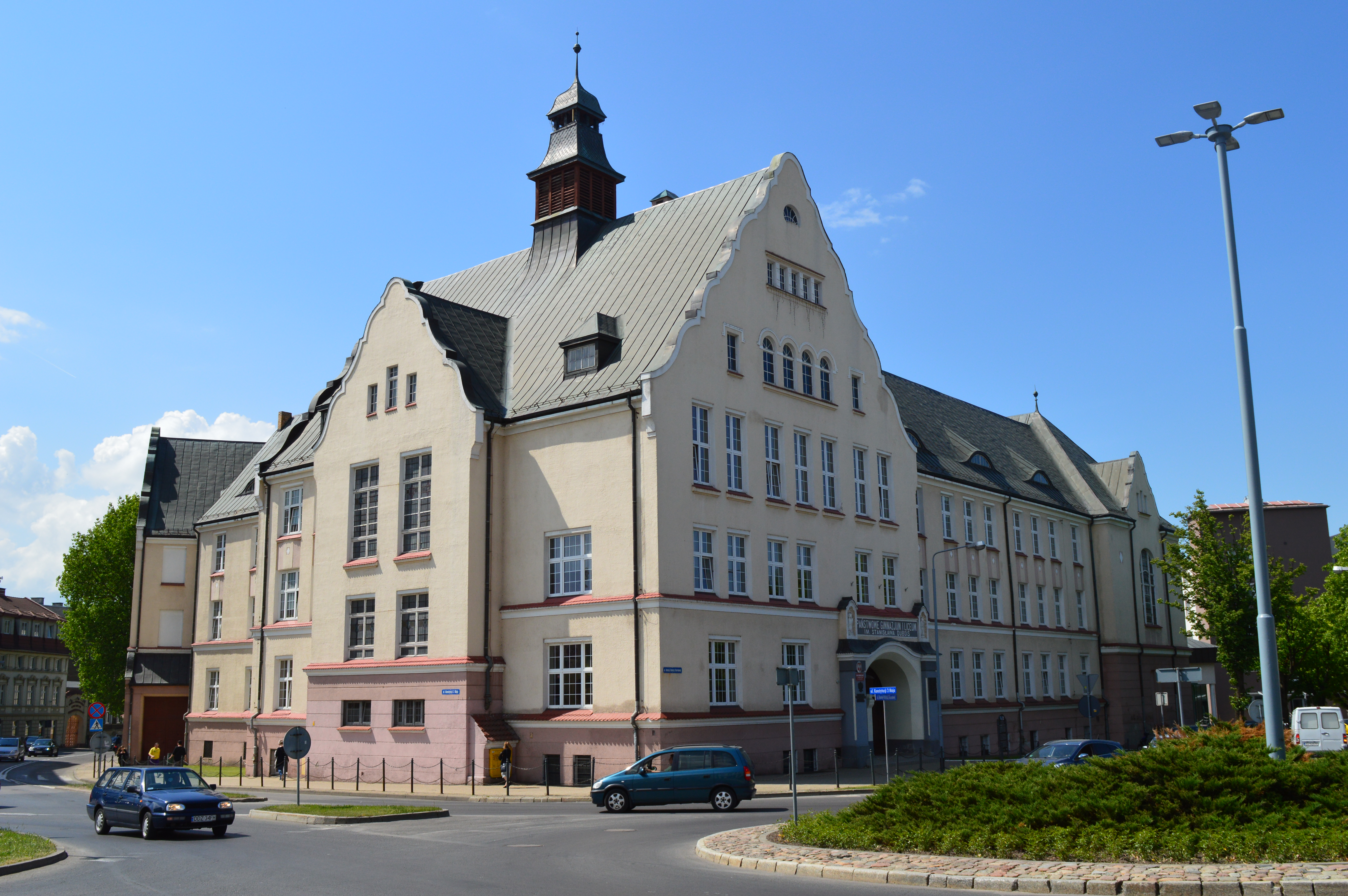 Budynek I Liceum Ogólnokształcącego im. Stanisława Dubois w Koszalinie